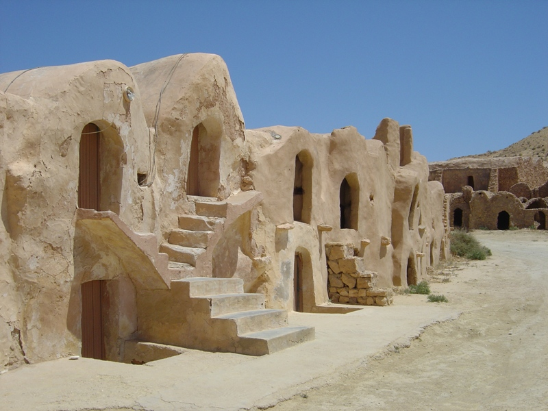 Auteur : Adel BARHEM Lieu : Ksar Hallouf Date : 22 avril 2006 Commentaire : Ksar berbère Appareil photo : Sony P10